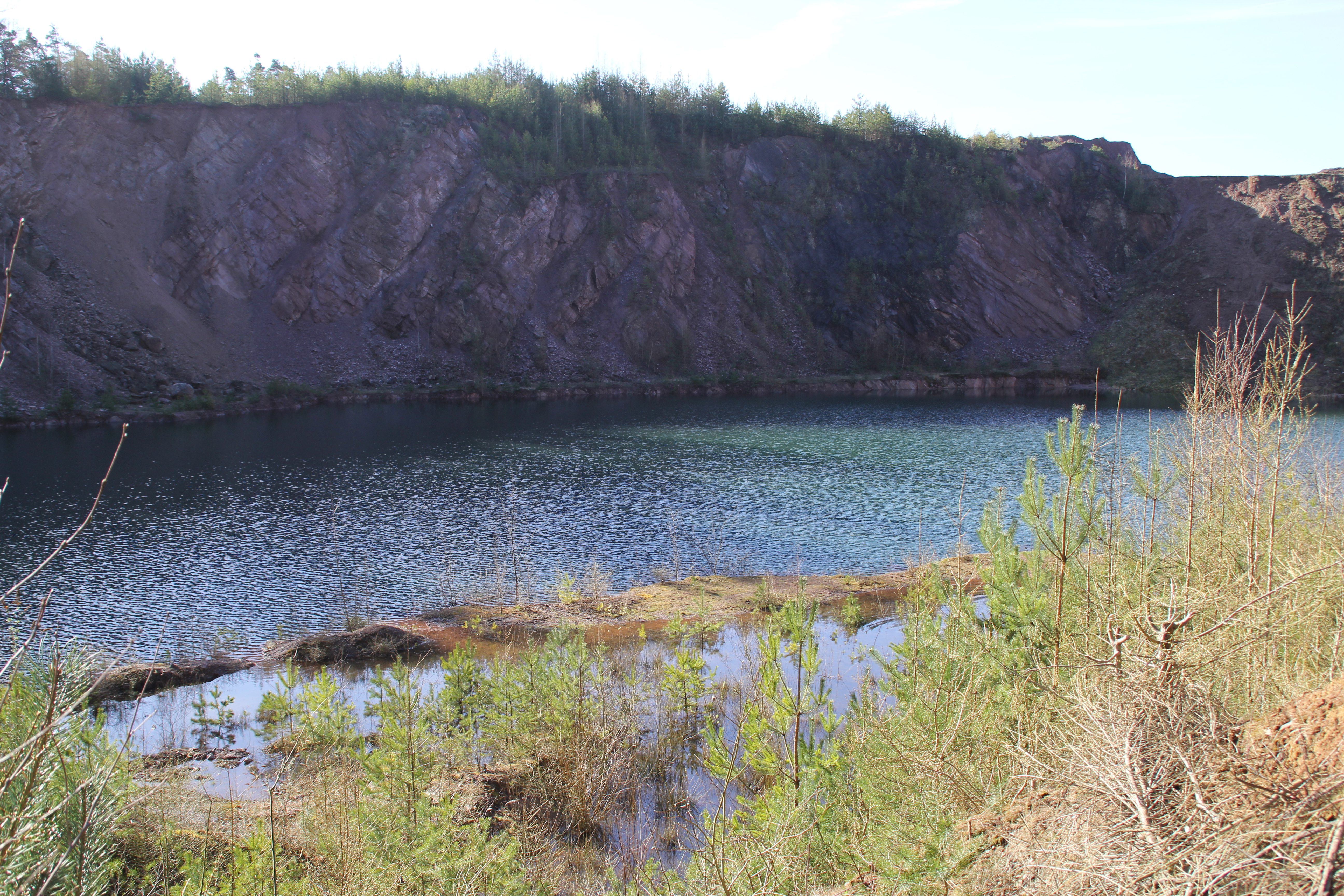 Der Hahnenkammsee im Spessart bei Mömbris, Bayern